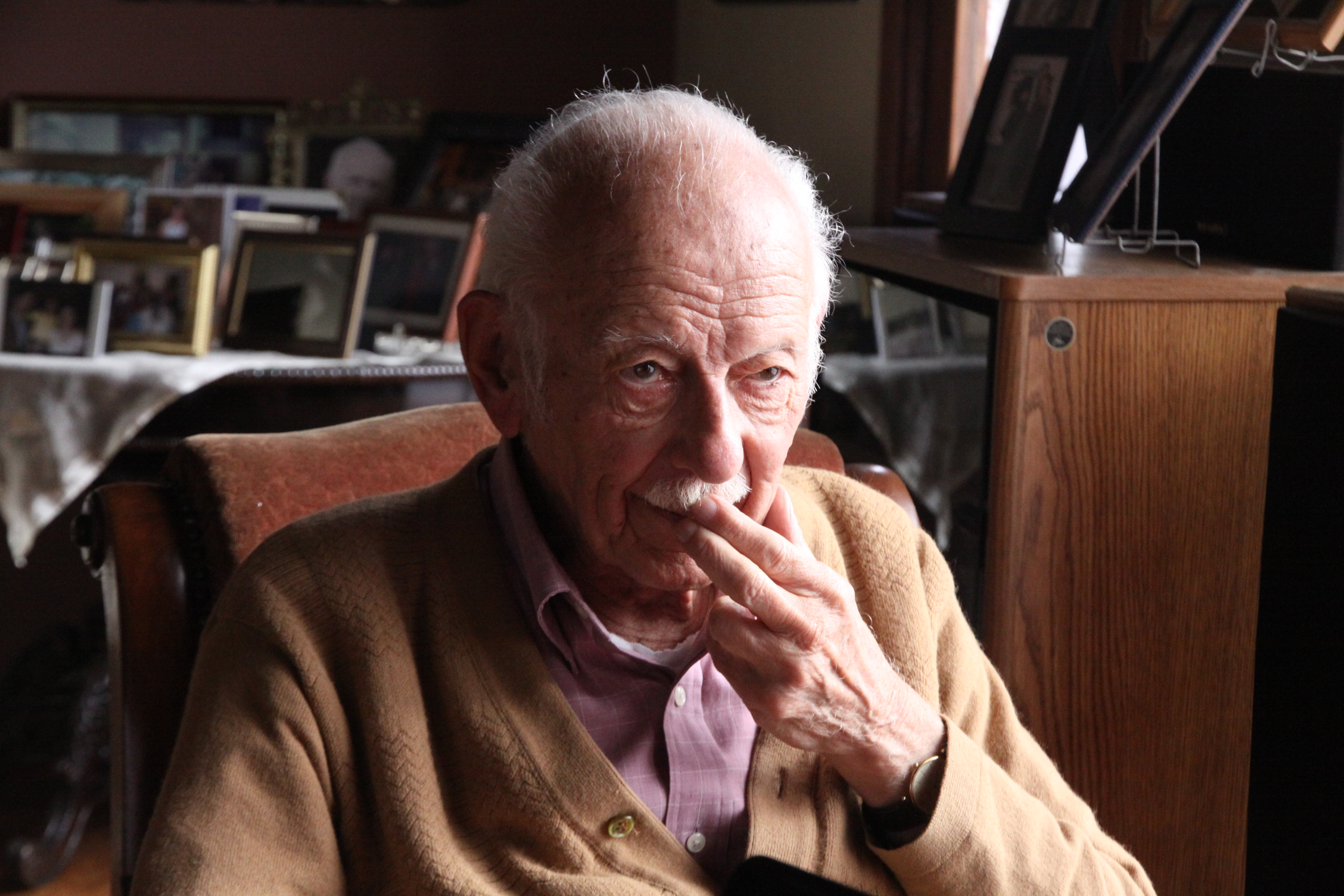 Foto: Hugo Ortiz Ron / Asamblea Nacional